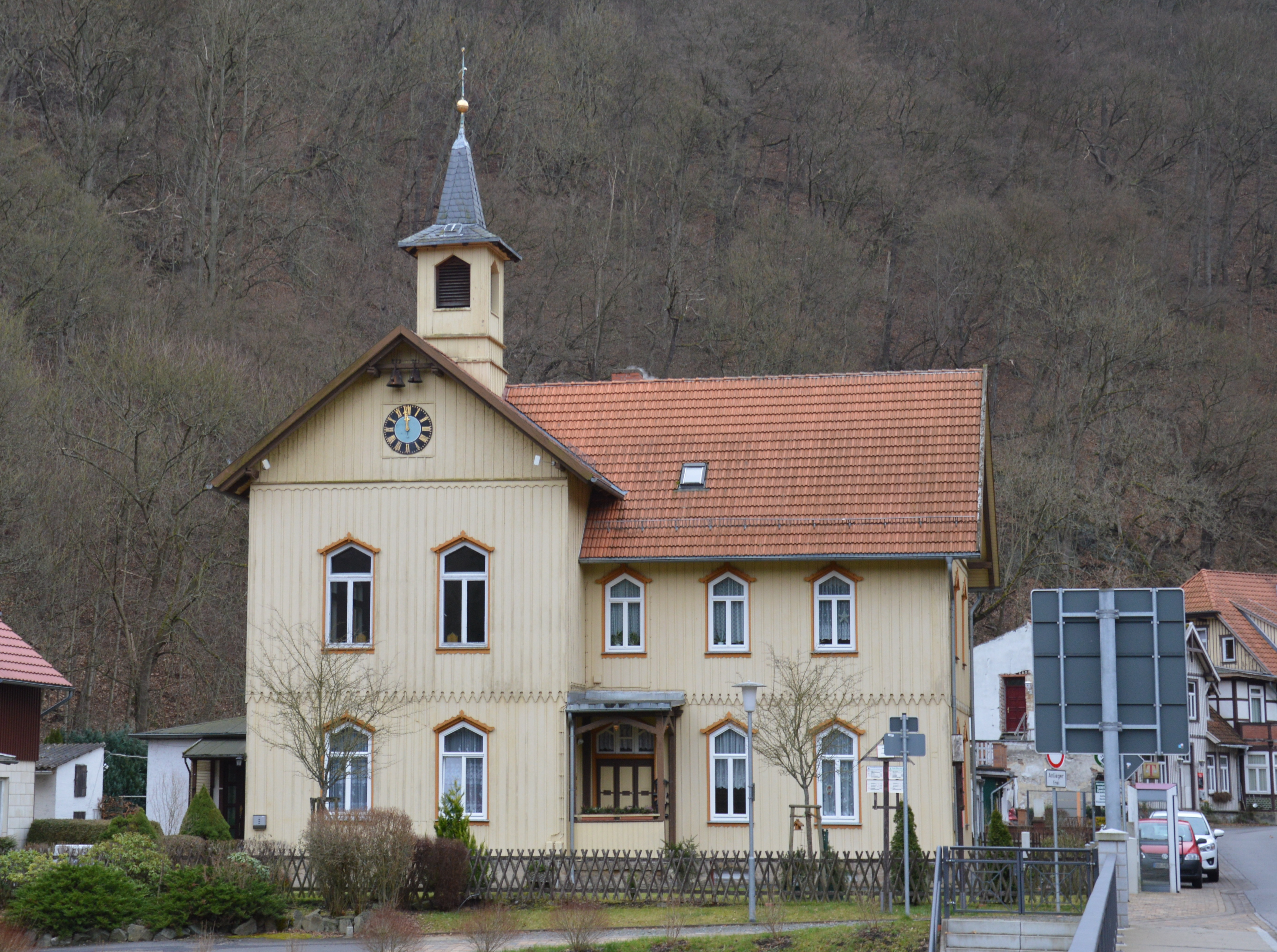 Kirche und Schule Treseburg